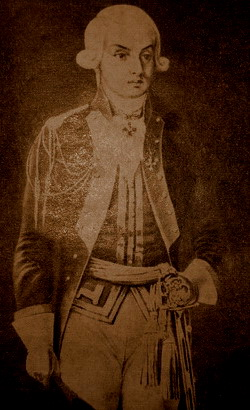 Н. Н. Раевский в форме полковника Нижегородского драгунского полка